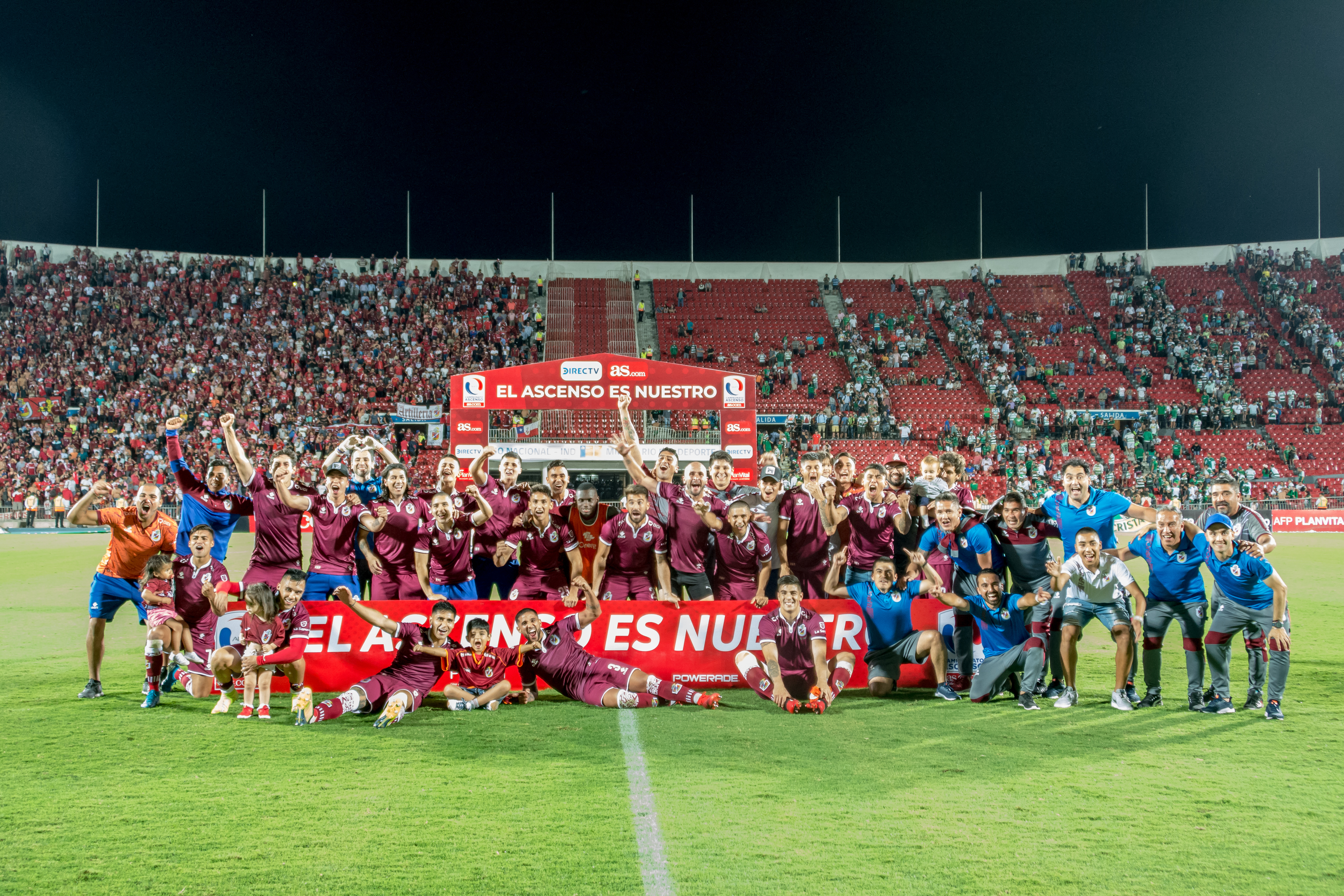 Deportes La Serena v Deportes Temuco, Estadio Nacional de Chile, Ñuñoa, Santiago, Región Metropolitana, Chile